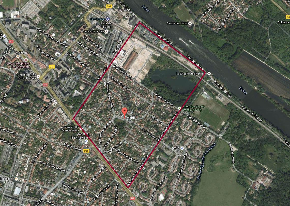 Schéma montrant l'emprise de l'ancien château de Fromont et de ses jardins disparus, sur le plan actuel de 2016.